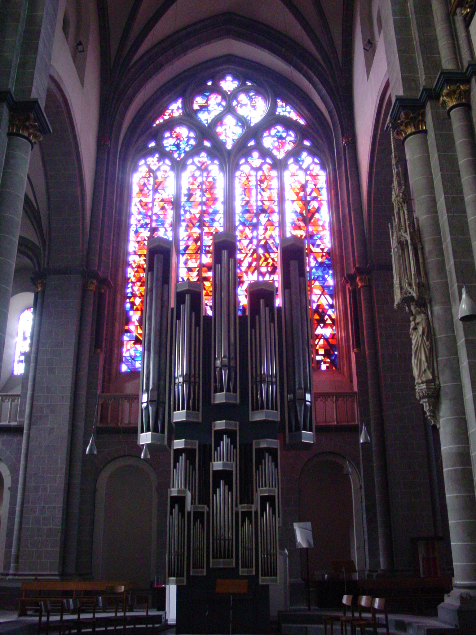 Eine der Domorgeln von St. Viktor, Xanten